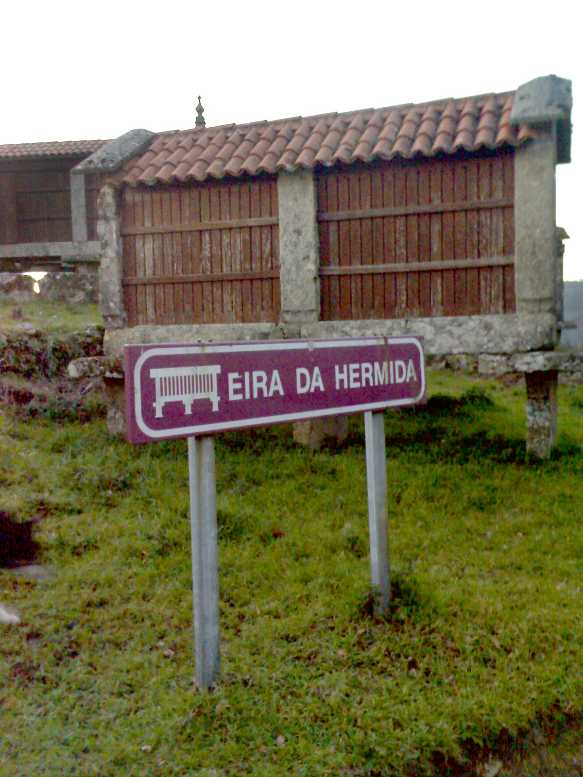 Conxunto de canastros en Filgueira (Castro)